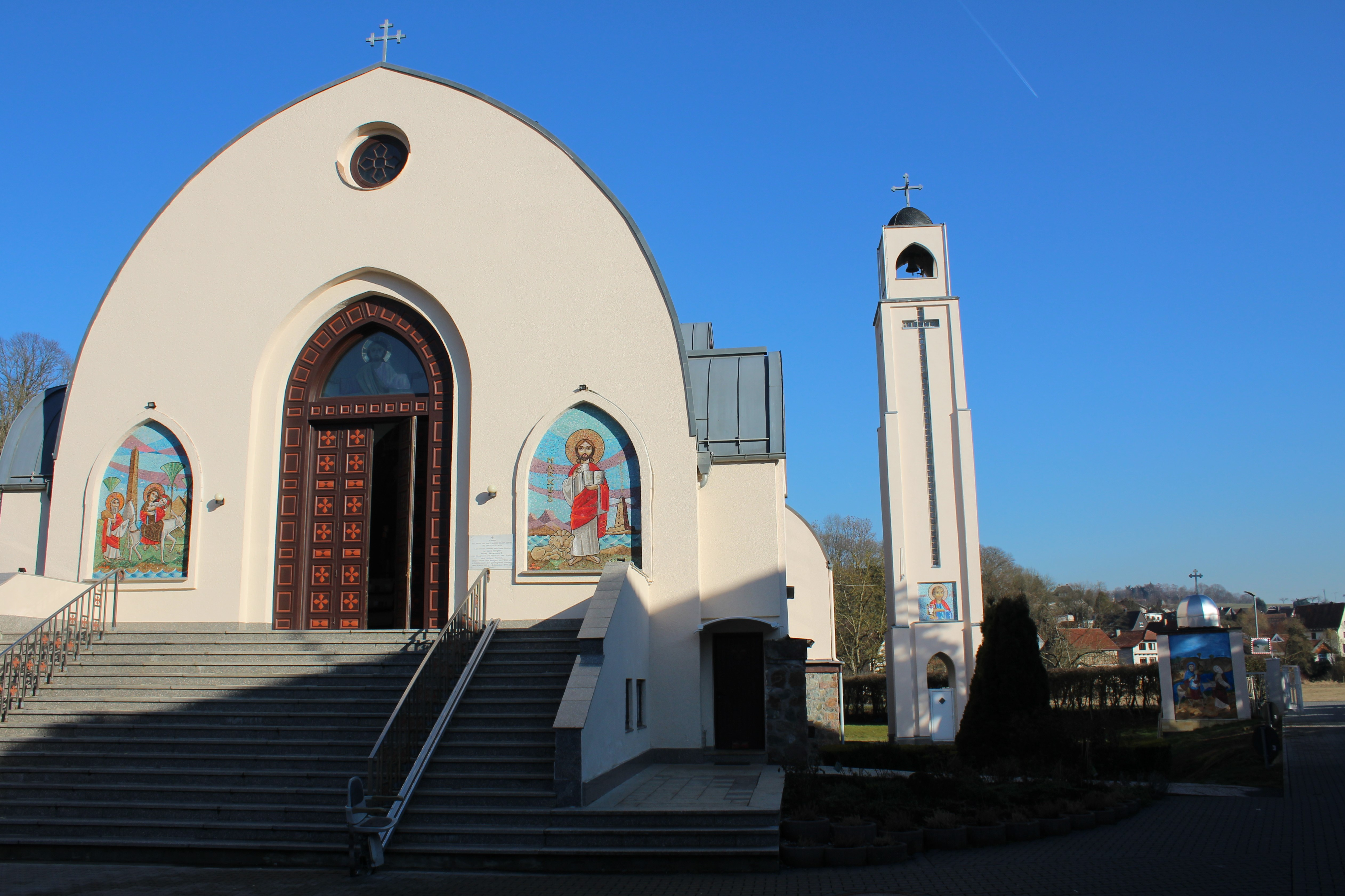 Koptisch-orthodoxes Kloster Ktröffelbach, Waldsolms, Lahn-Dill-Kreis, Hessen, Deutschland